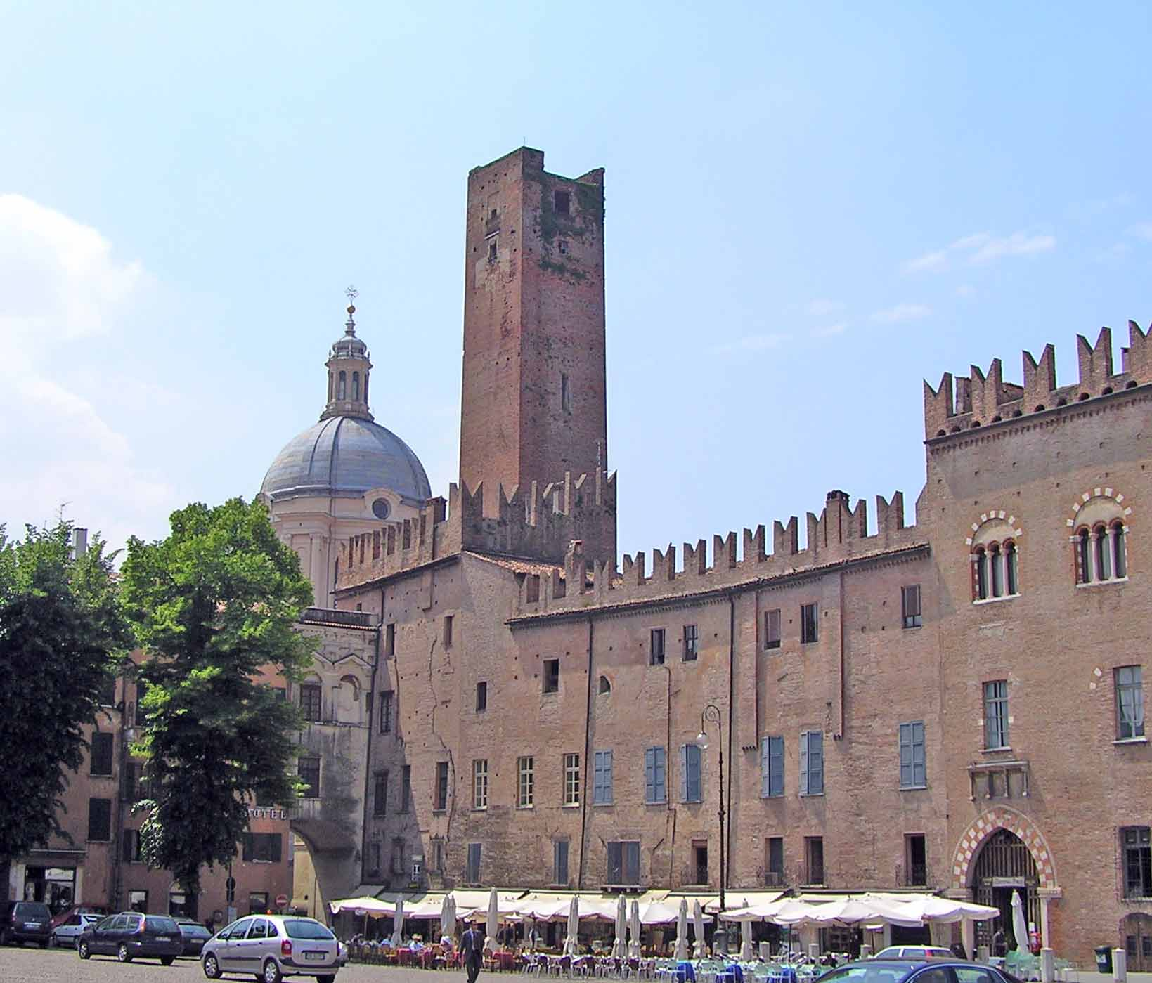 Piazza Sordello a Mantova.